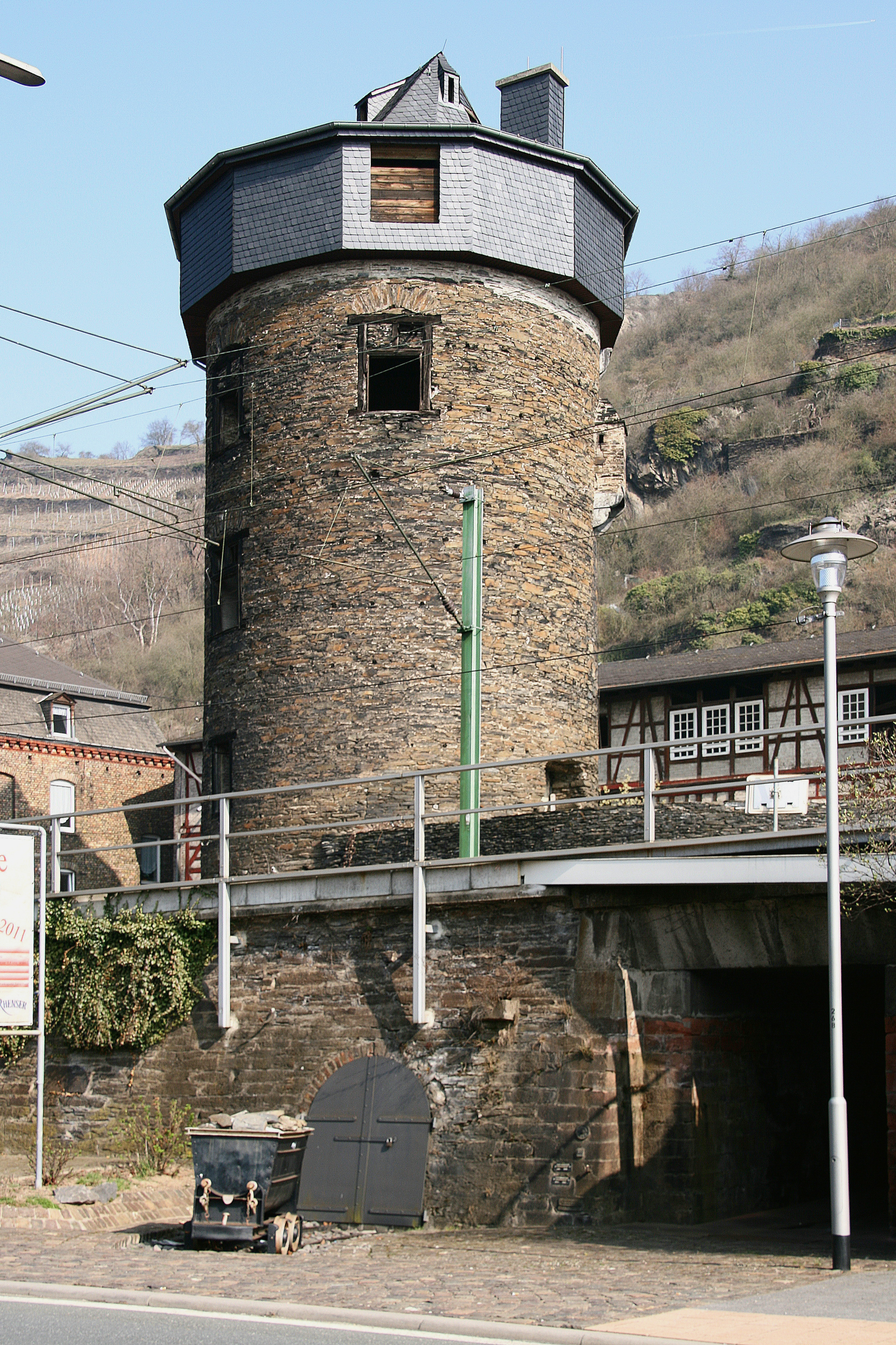 Kaub: Lore der Grube Wilhelm-Erbstollen vor dem Tunnel, der vom Dicken Turm zum Rhein führt. Rechts im Bild das Spalthaus.